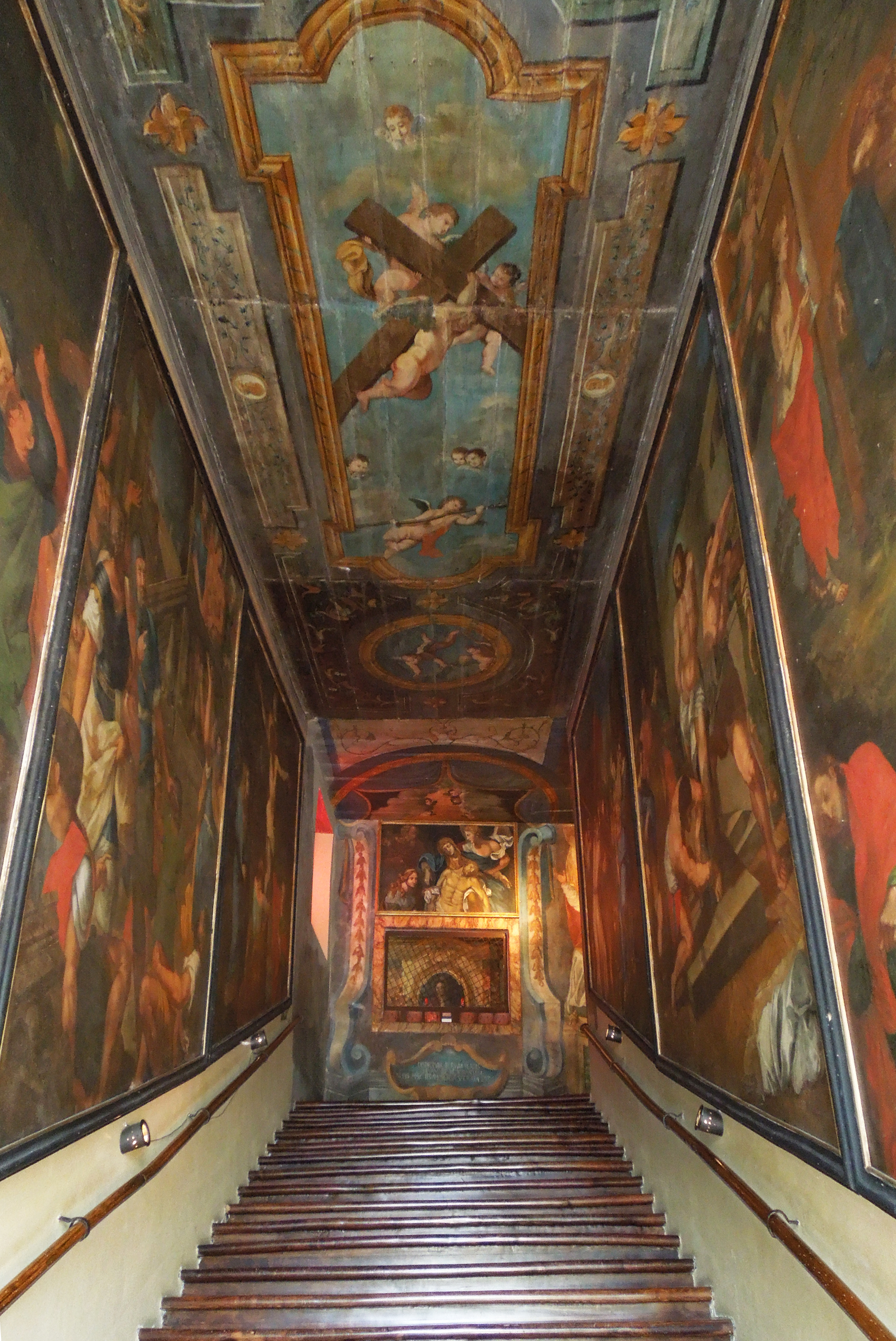 Scala Santa di Campli in provincia di Teramo, gradini di ascesa in legno d'ulivo.